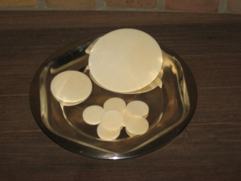 Hostien der kath. Kirche